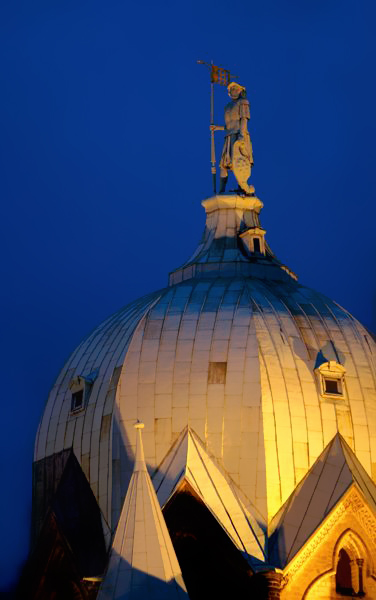 Kuppel des Neusser Quirinus-Münster (Original text : Neusser Quirinus-Münster im Abendlicht) Kamera: Canon EOS 10D Software: Adobe Photoshop